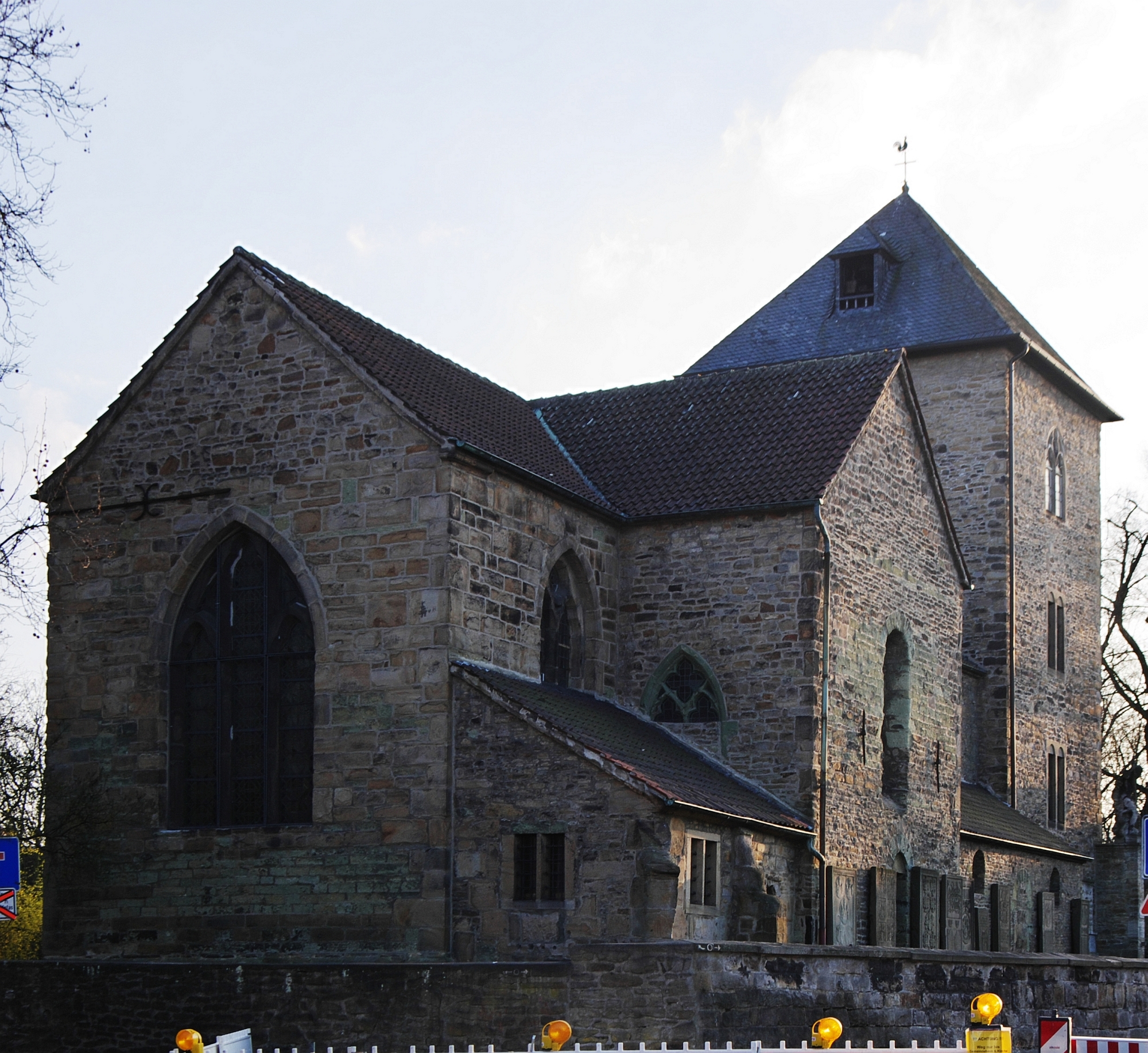 Denkmalgeschützte Kirche St. Georg in Dortmund-Aplerbeck.